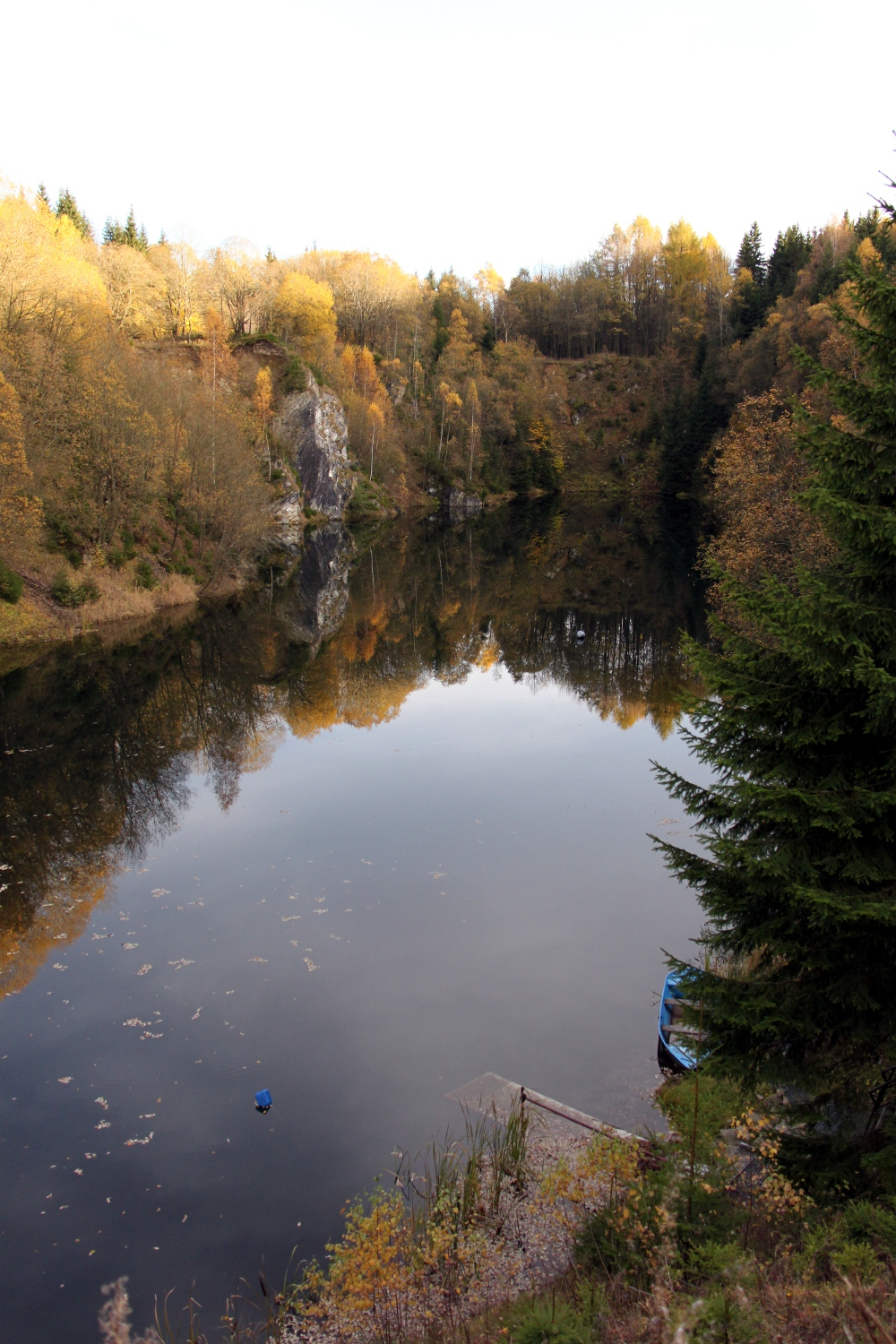 Ehemaliger Kalkbruch in Crottendorf